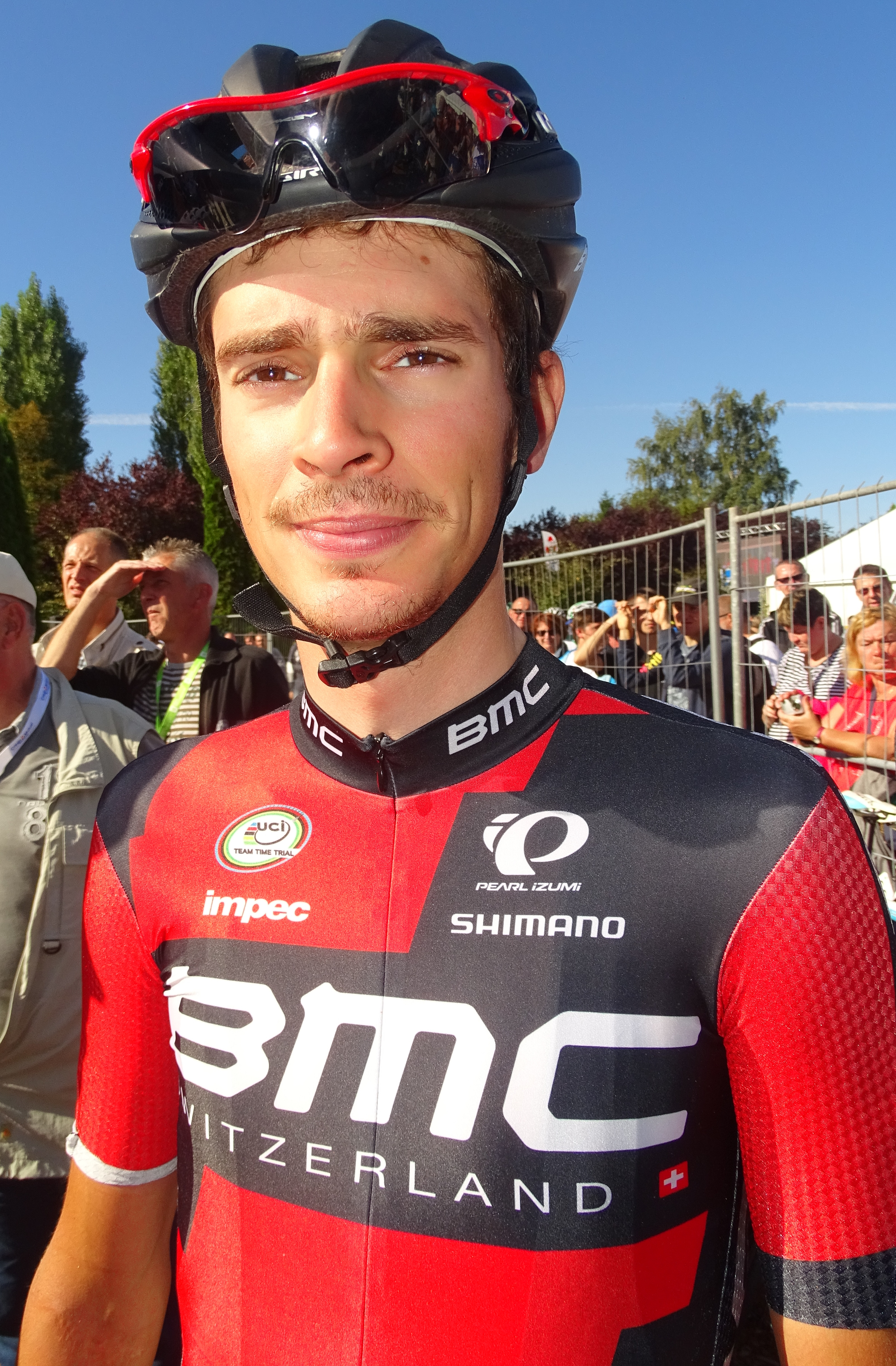 Reportage réalisé le dimanche 20 septembre à l'occasion du départ et de l'arrivée du Grand Prix d'Isbergues 2015 à Isbergues, Nord-Pas-de-Calais, France.